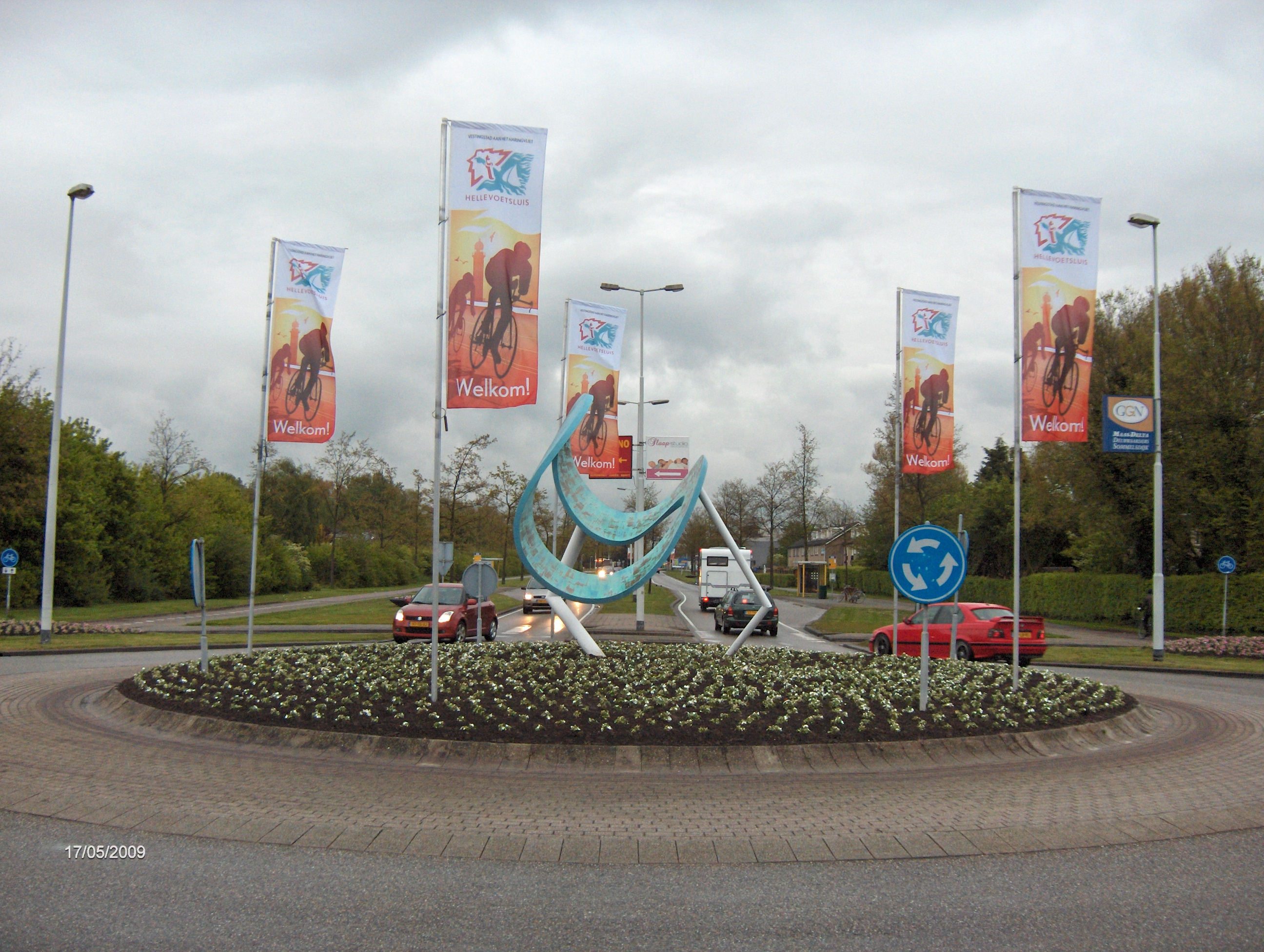 Stad: Hellevoetsluis, Wijk: Noordwest, Straat: Amnesty Internationallaan, Details: Rotonde bij afslag de Sportlaan, met vlaggen van de Giro D'Italia